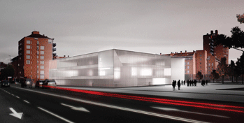 Projecte Biblioteca Pública Carles Rahola